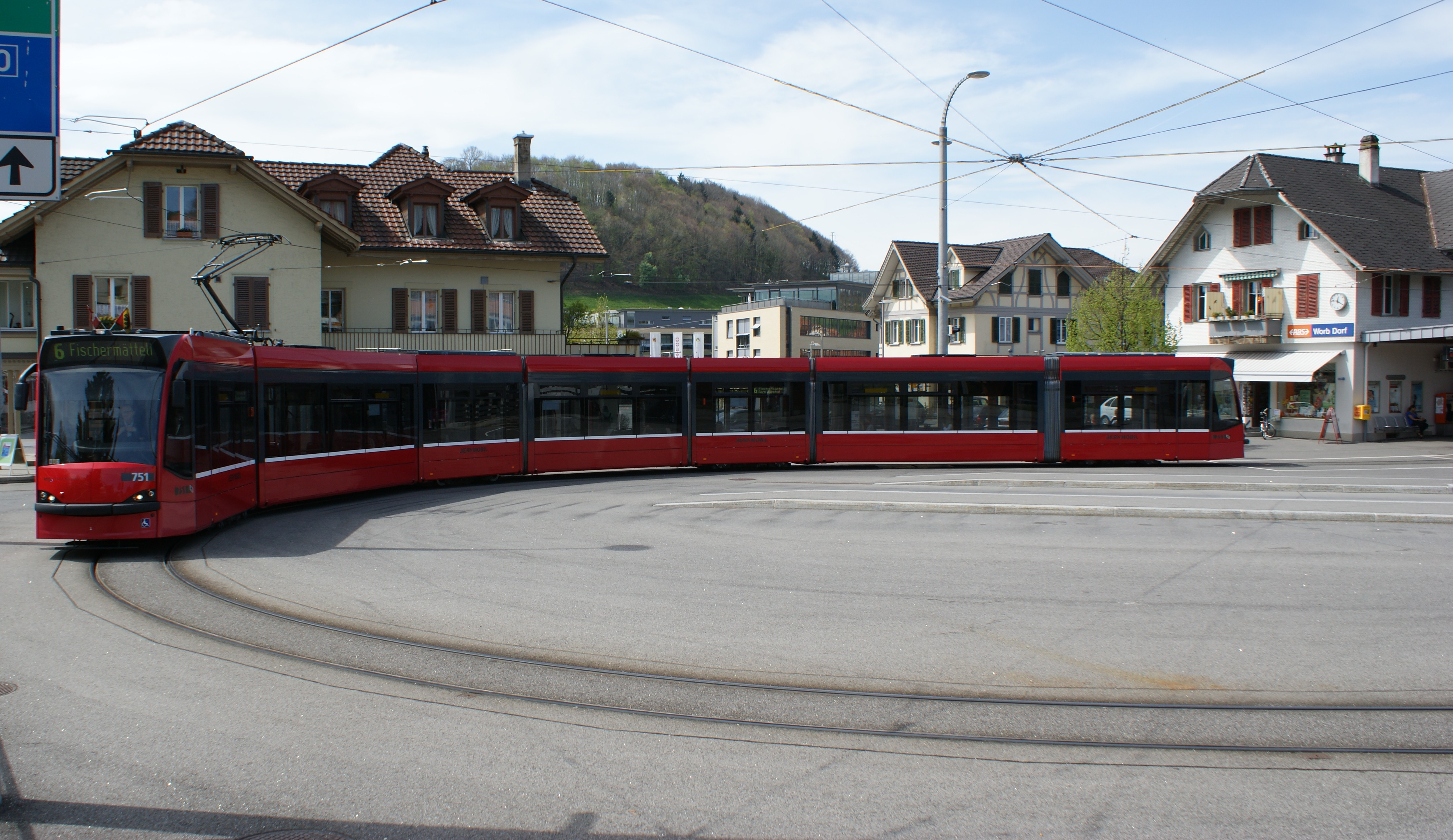 SVB Bernmobil Be 6/8 751 auf der Linie 6 ist soeben in Worb Dorf abgefahren und befährt zunächst die Wendeschleife um dann nach Bern zu fahren.